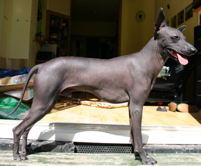 Peruvian Hairless Dog Perro Sin Pelo del Perú Inca Hairless Dog Viringo Author : Sonja Kolijn